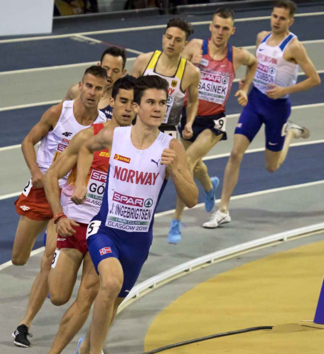 EKI30505 1500m man lewandowsky ingebrigtsen